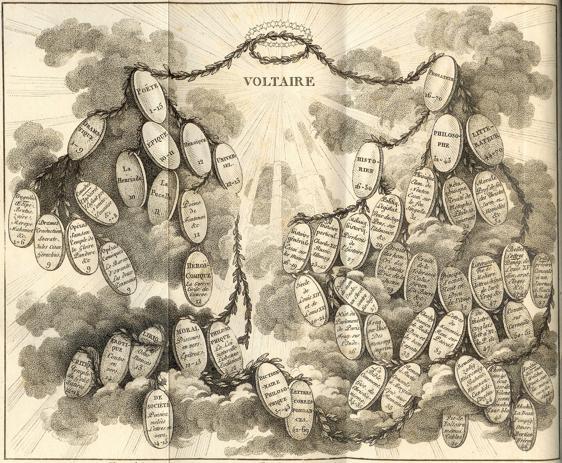 Aufbauplan der Kehler Werksausgabe Voltaires aus Band 70.